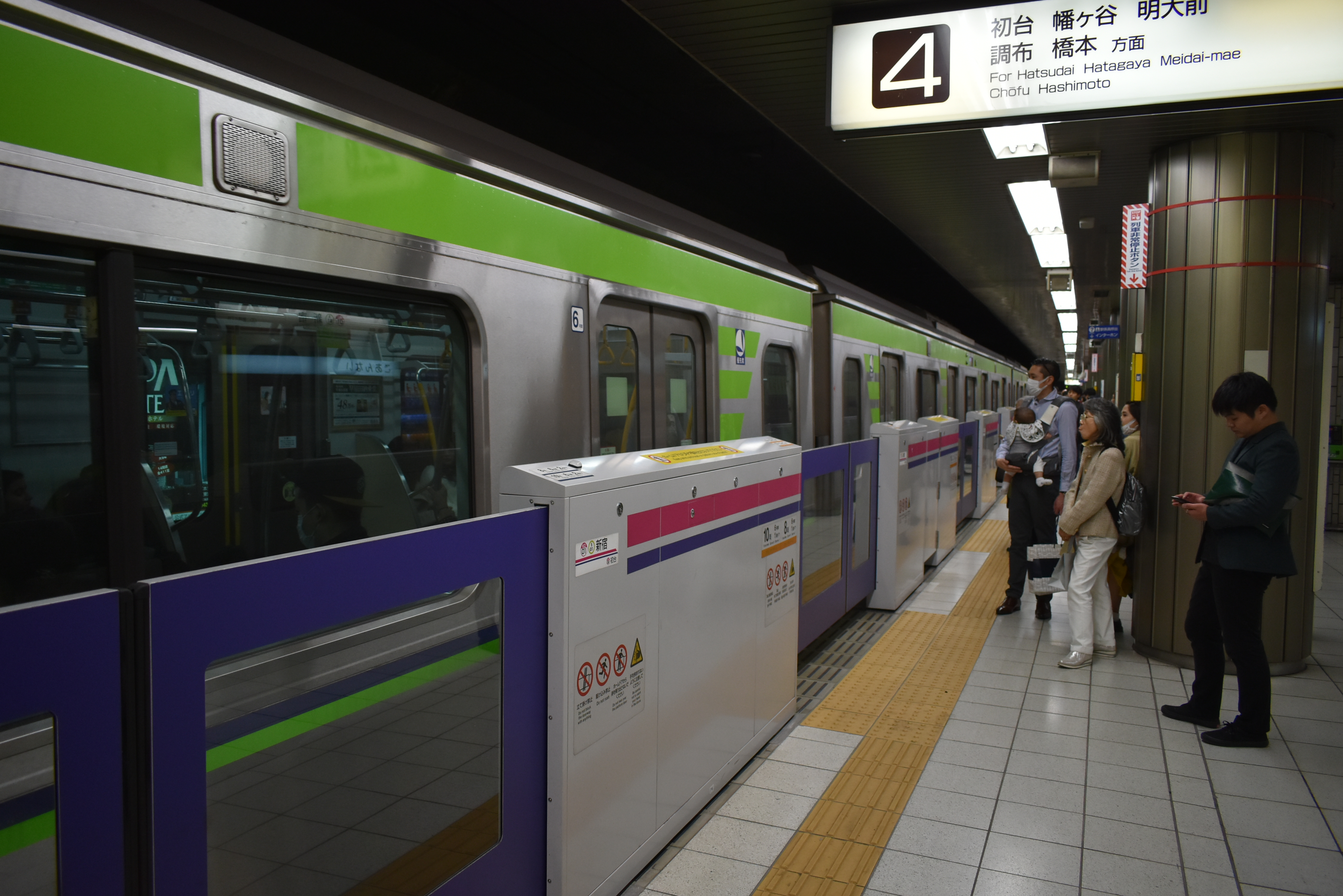 京王新線 新宿駅 Nikon D3400